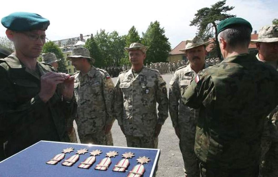 Arkadiusz Górniak